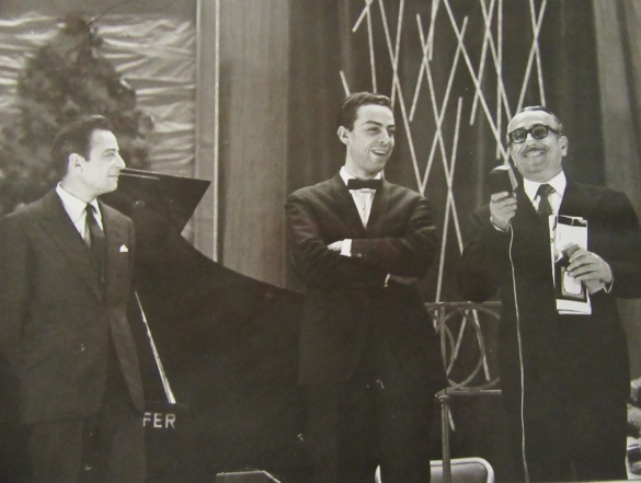 L'attore Carlo D'Angelo sul palco del Teatro Nuovo con Daniele Piombi